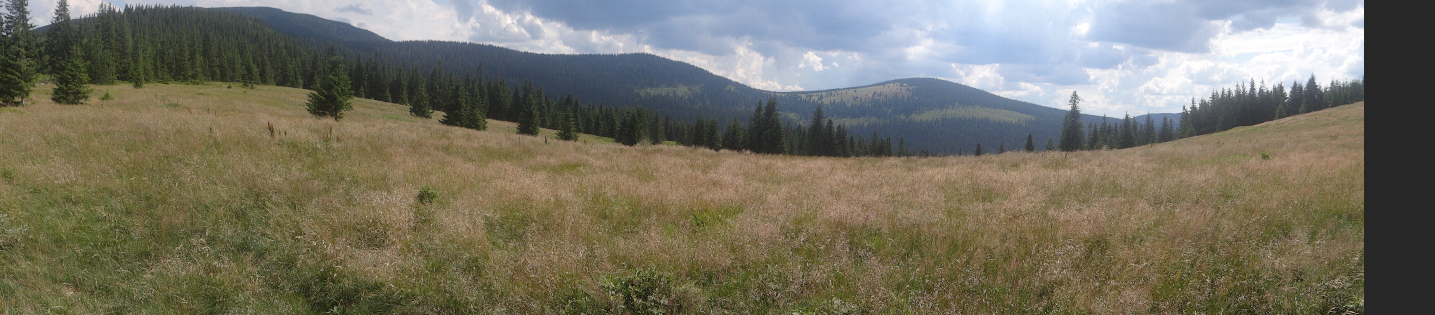 Hala Jodłowcowa i panorama widokowa na południowy zachód